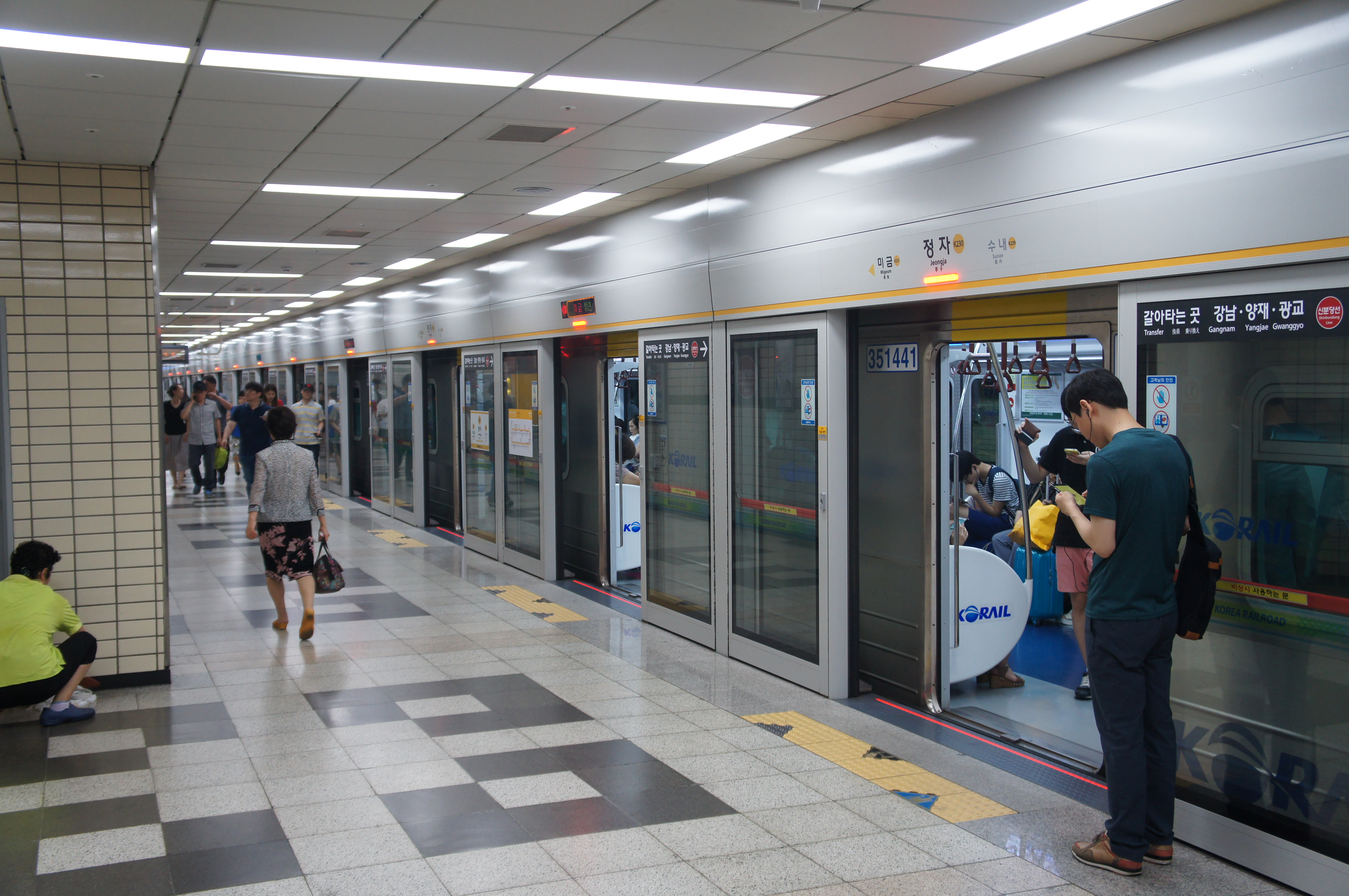 정자역 분당선 승강장